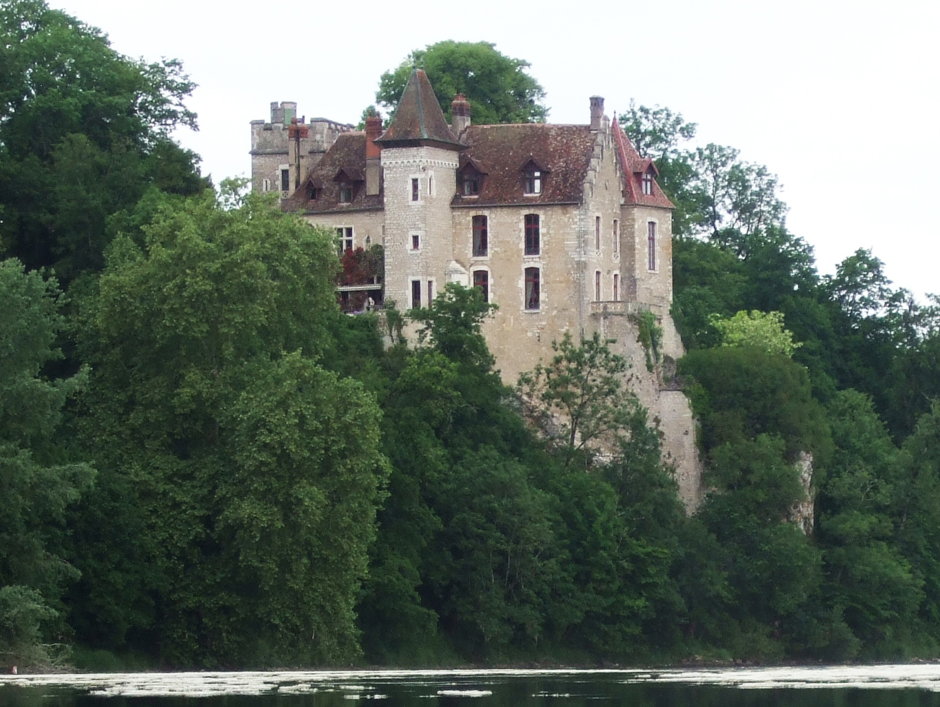 Château deThoraise